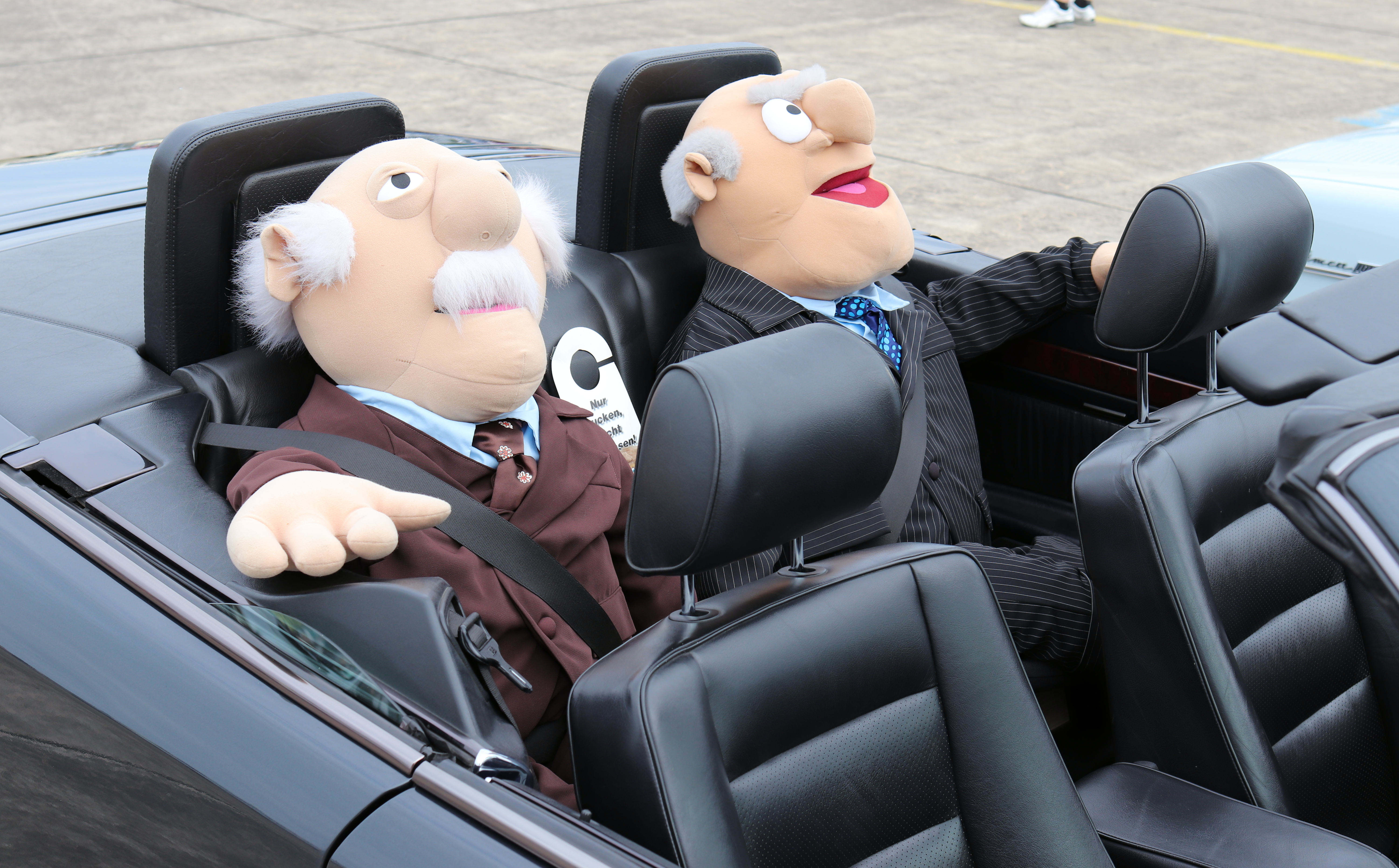 Oldtimer Fly- & Drive in auf dem Flugplatz Mönchengladbach am 29. Juli 2018. Waldorf und Statler in einem Mercedes Coupé A124.